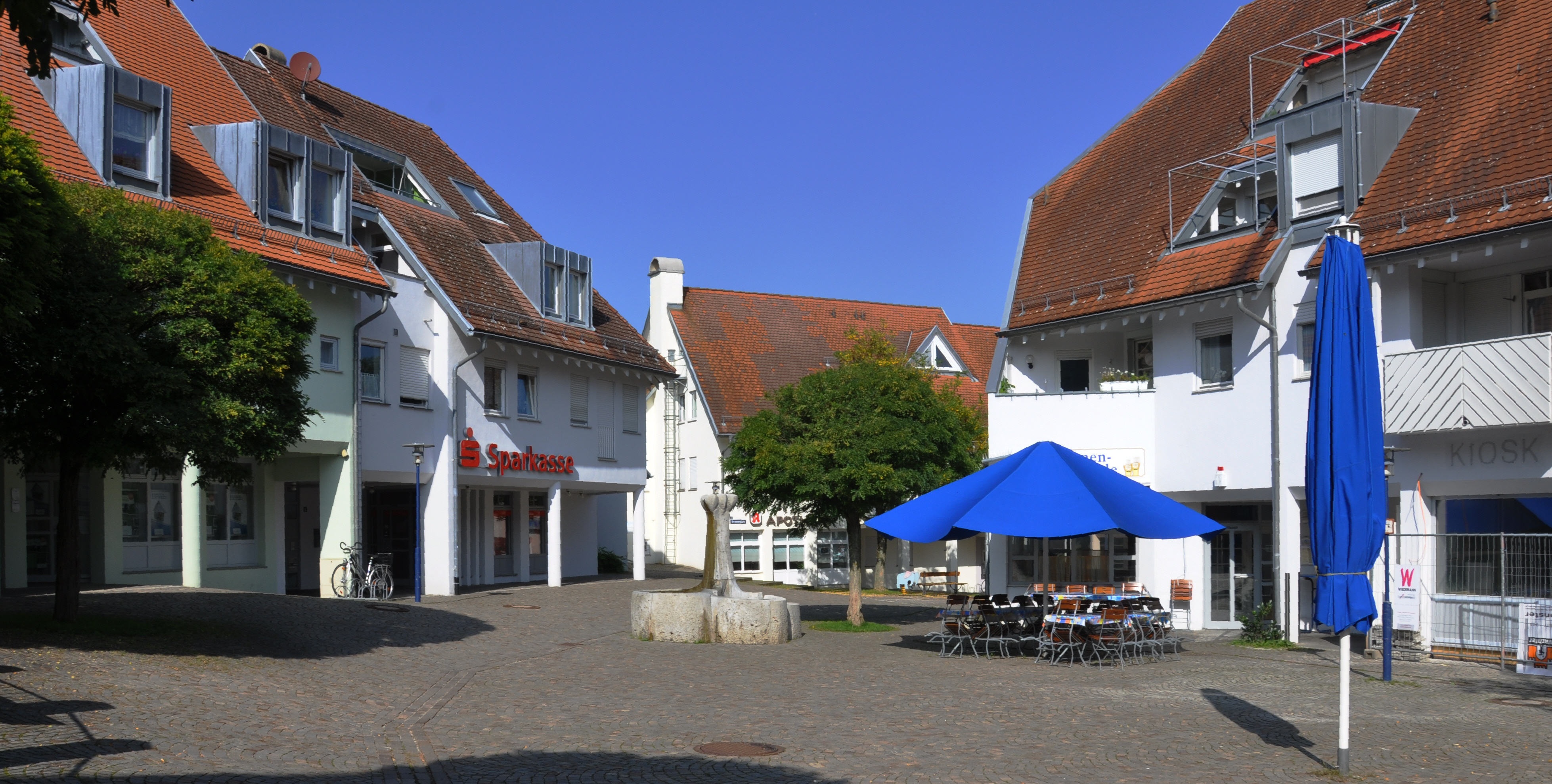 Berg (Schussental)